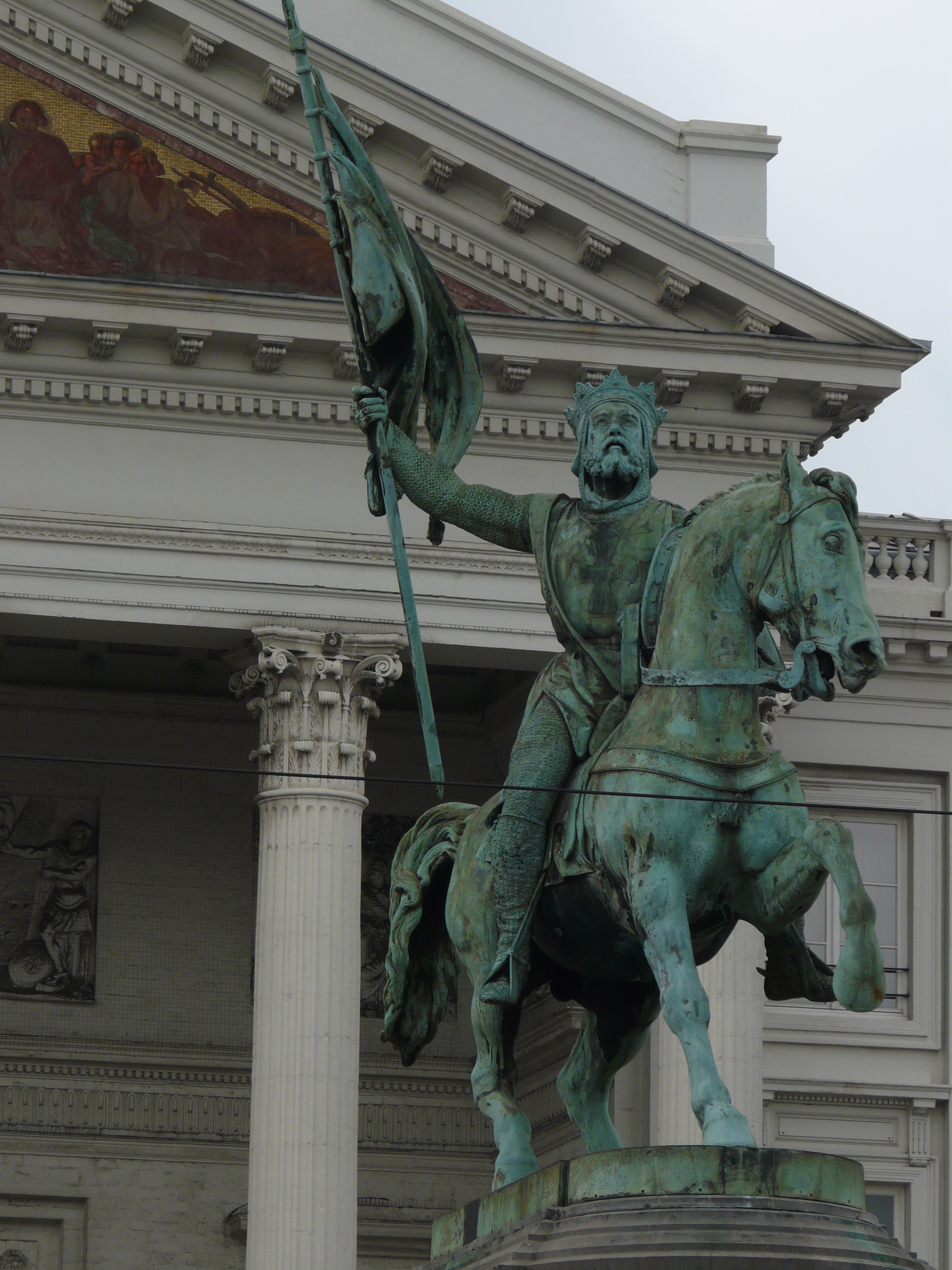 Standbeeld van Godfried van Bouillon op het Koningsplein in Brussel